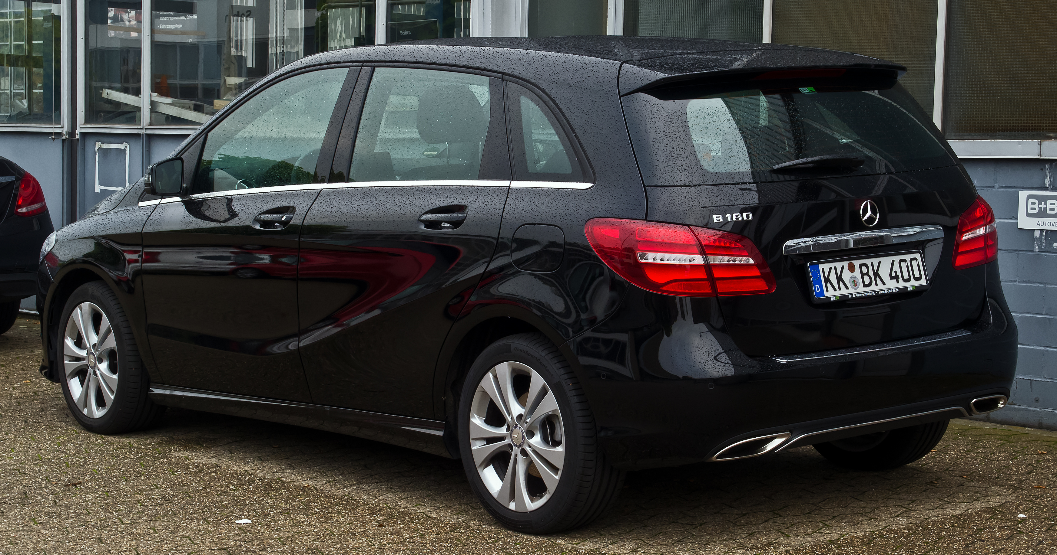 Mercedes-Benz B 180 Urban (W 246, Facelift)